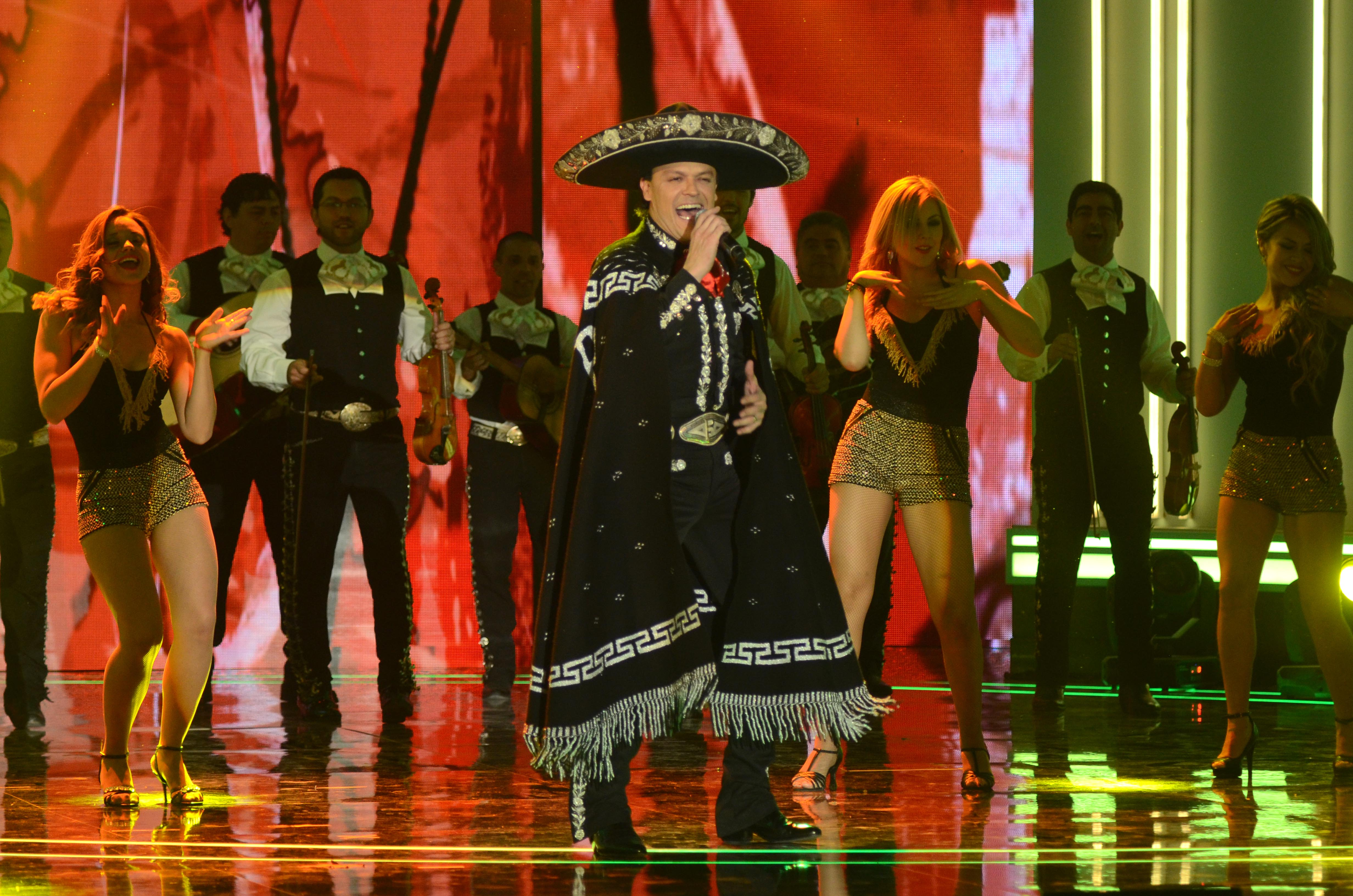 Ministro Elizalde asiste a la Ceremonia Inaugural de la Teletón